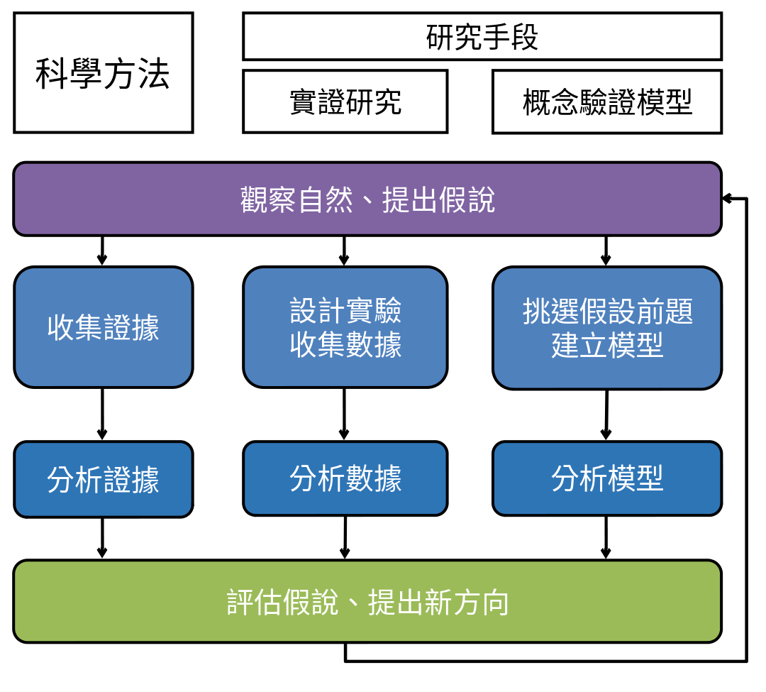 中文（台灣）: 比較實證研究和概念驗證模型如何使用科學方法。翻譯自 Servedio et al. (2014) PLoS biology 12, no. 12。